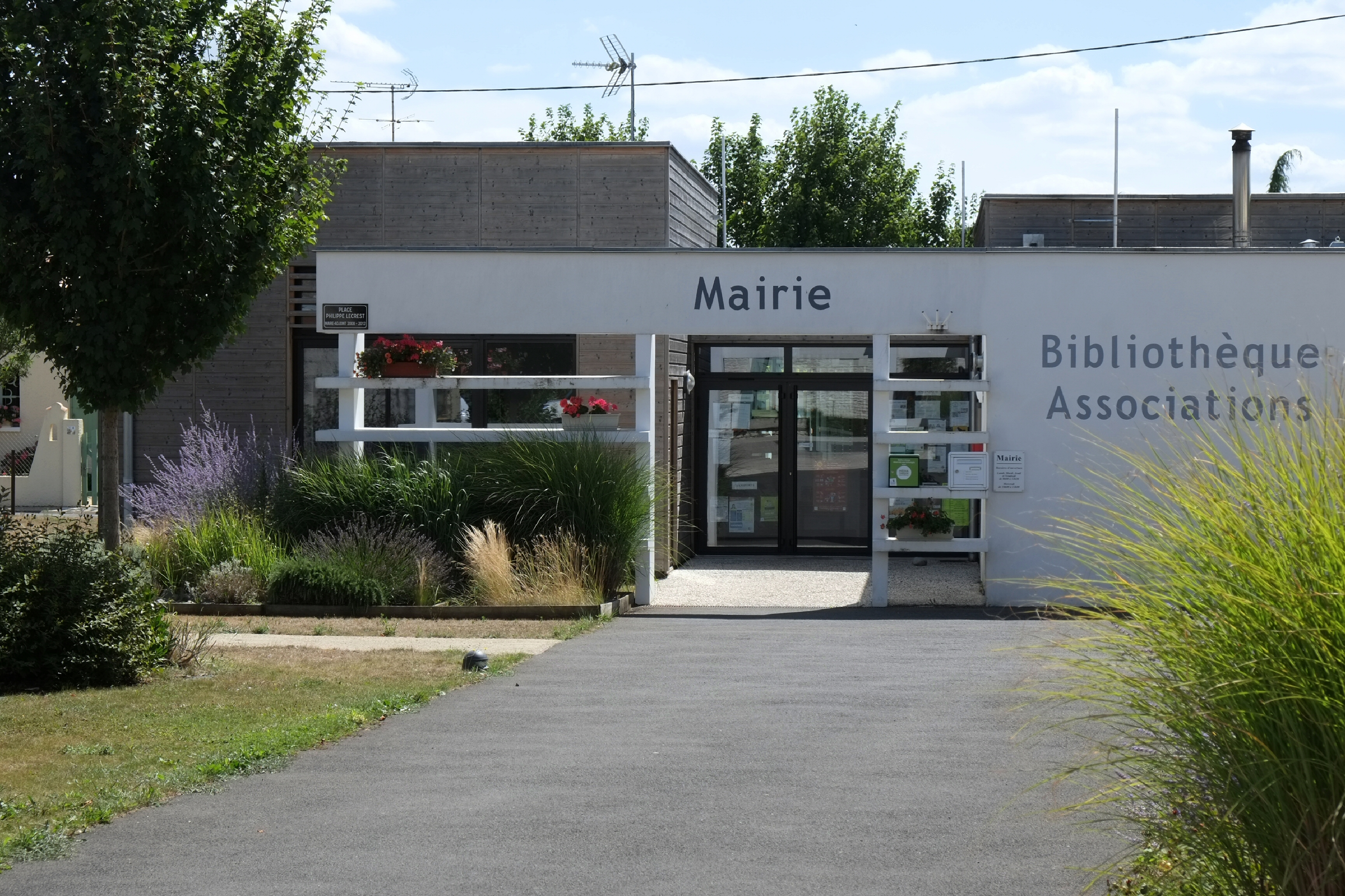 Mairie La Laigne Charente-Maritime France